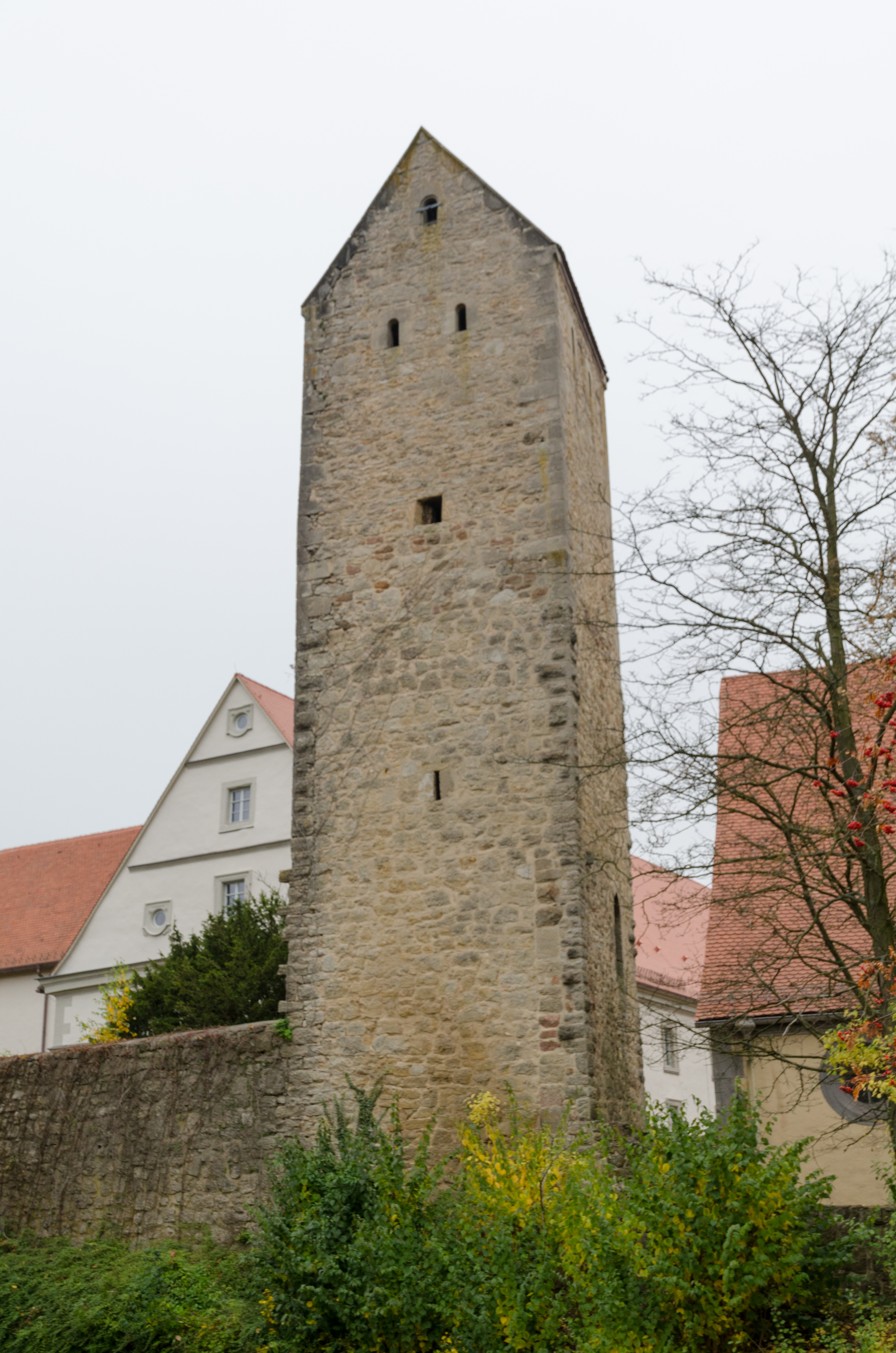 Stadtmauer Flandungen